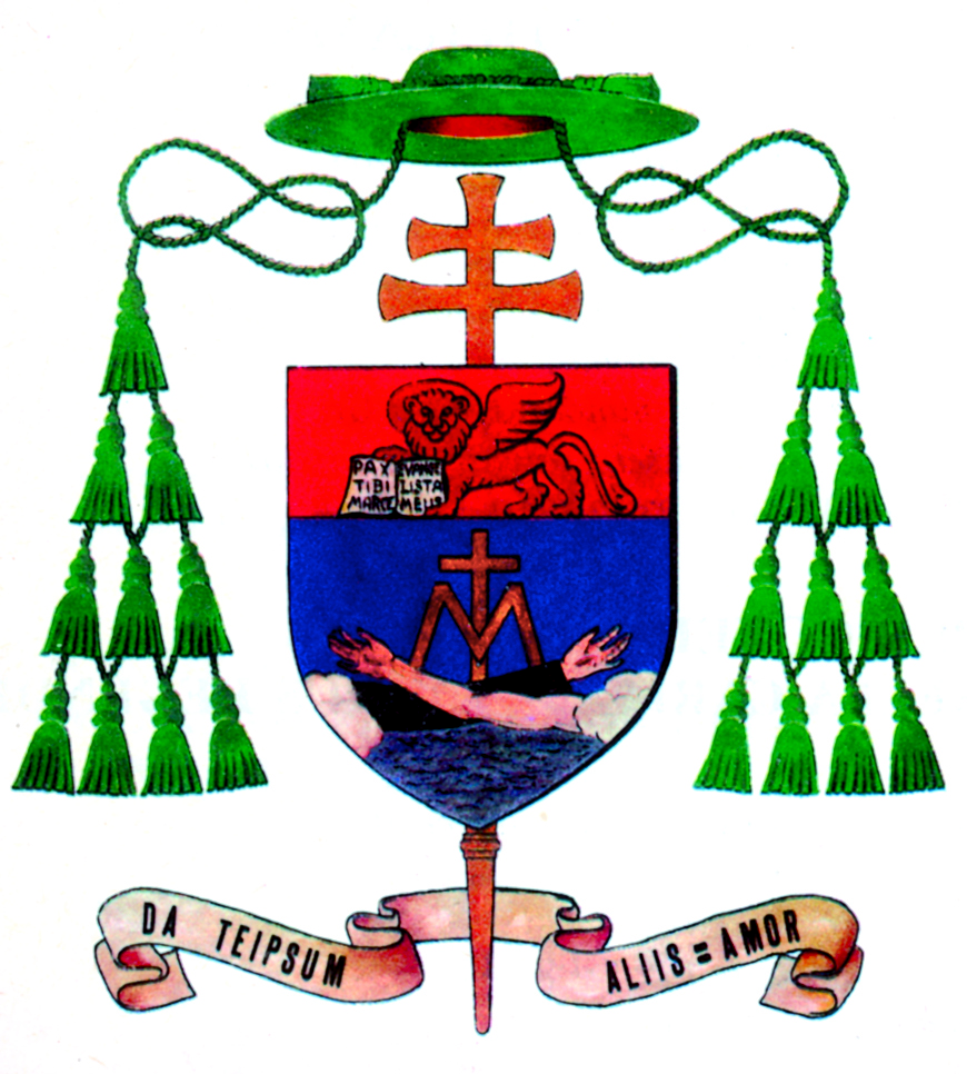 stemma di Antonio Vitale Bommarco